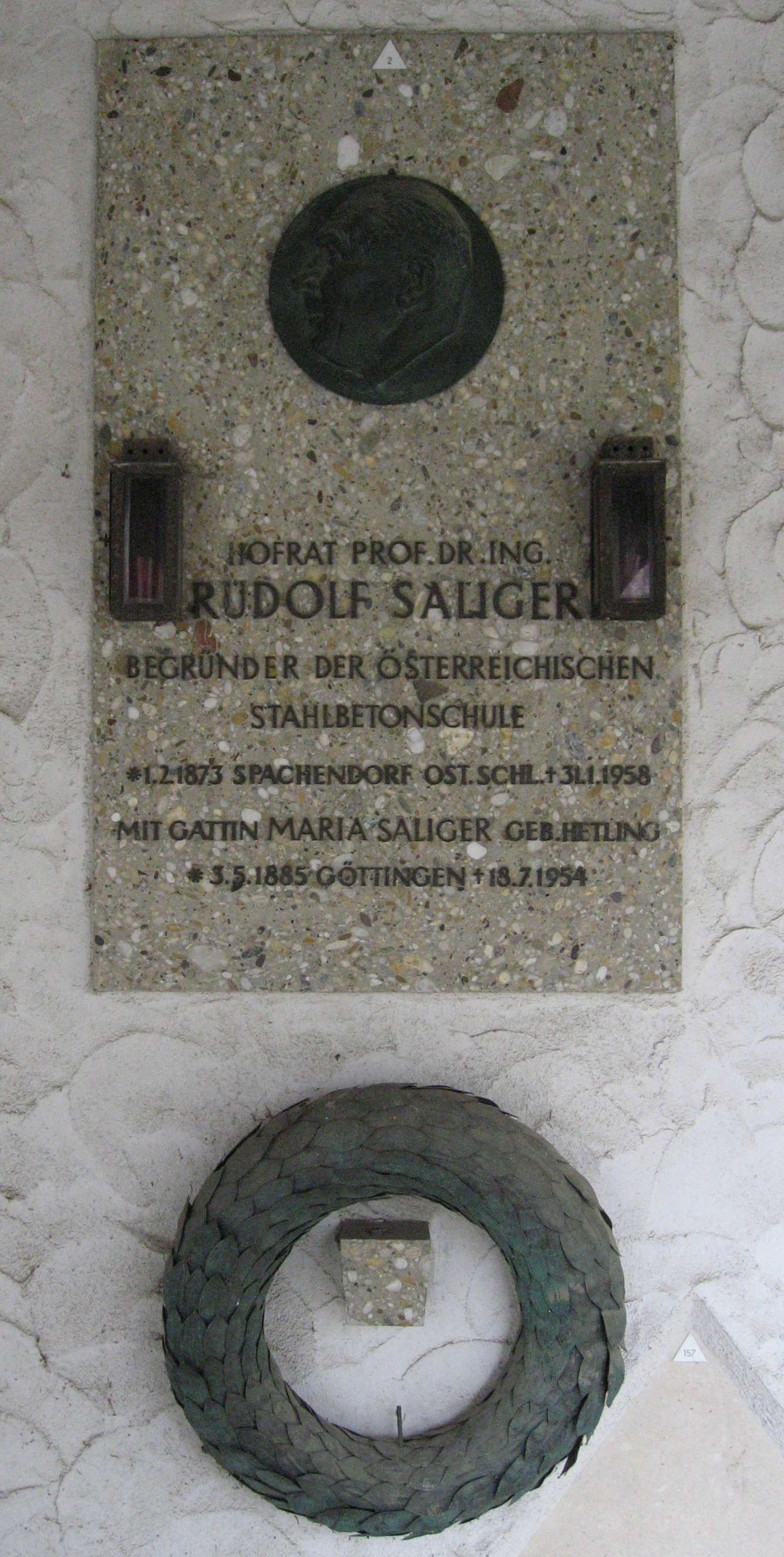 Wien, Feuerhalle Simmering, Urnengrabstelle Rudolf Saliger